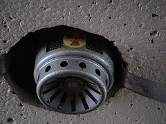 Радиоизотопный дымовой извещатель КИ-1